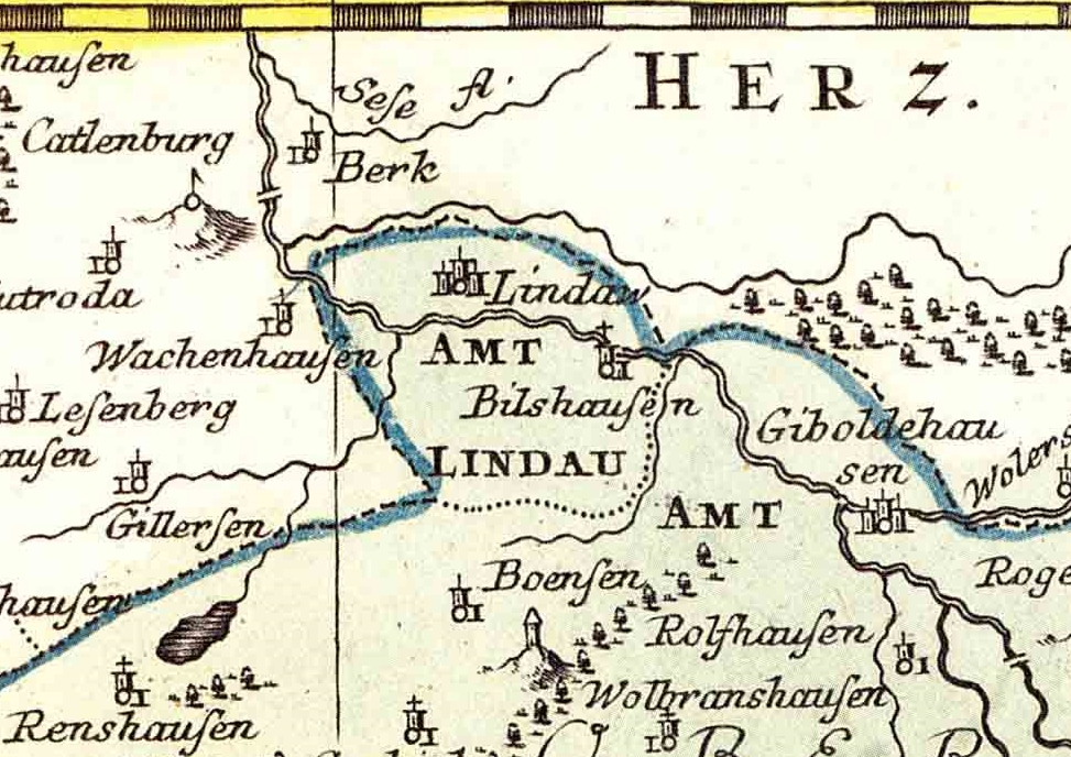 Ausschnitt aus der historischen Karte "Tractus Eichsfeldiae": das Amt Lindau